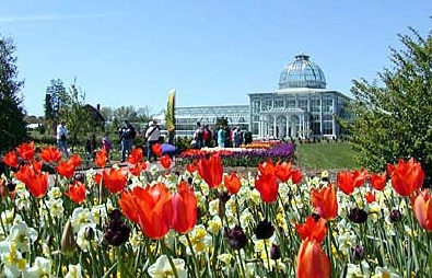 Jardín botánico en Richmond